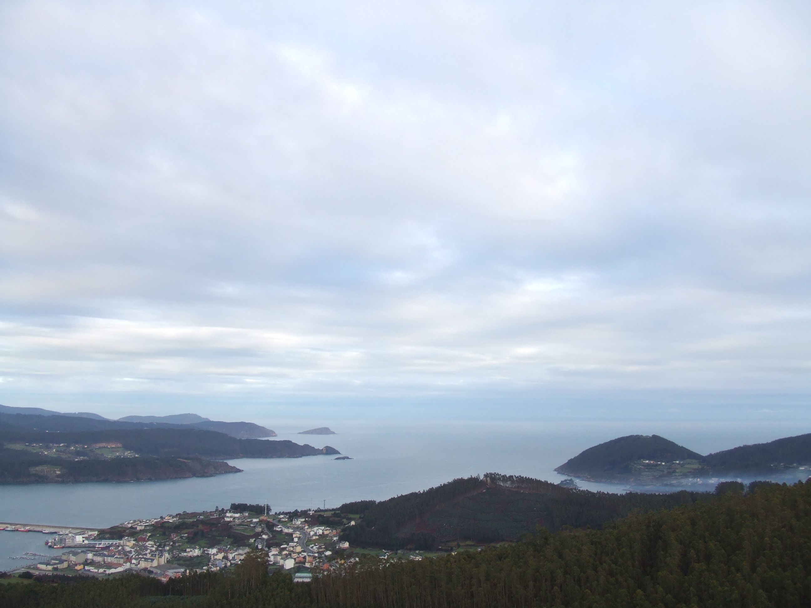 Ría de Viveiro - Lugo - Galiza